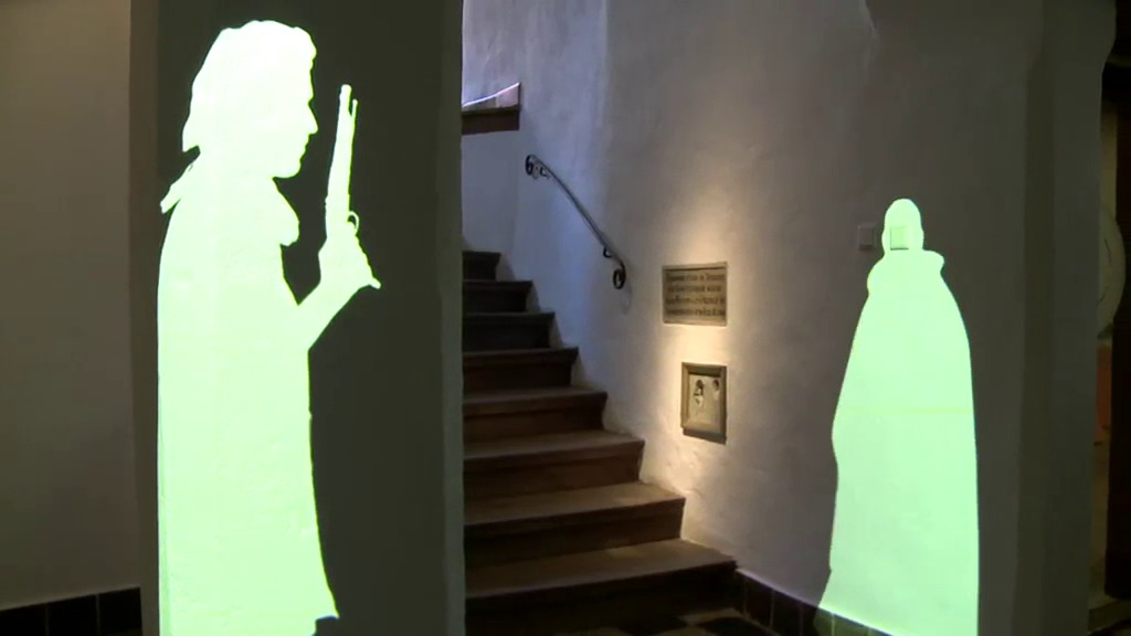 Museum Prinsenhof Delft